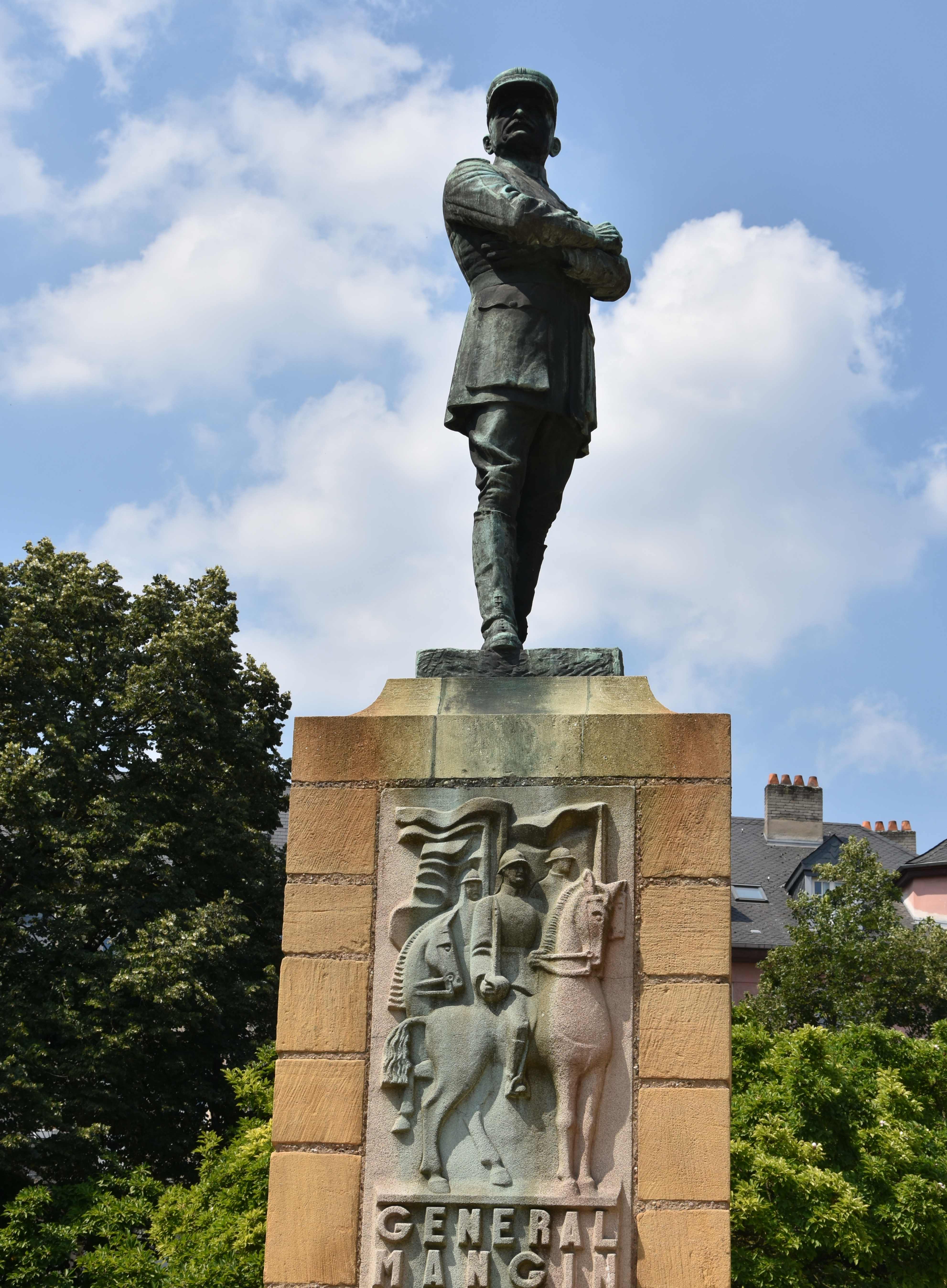 Metz Charles Mangin 24-07-2018